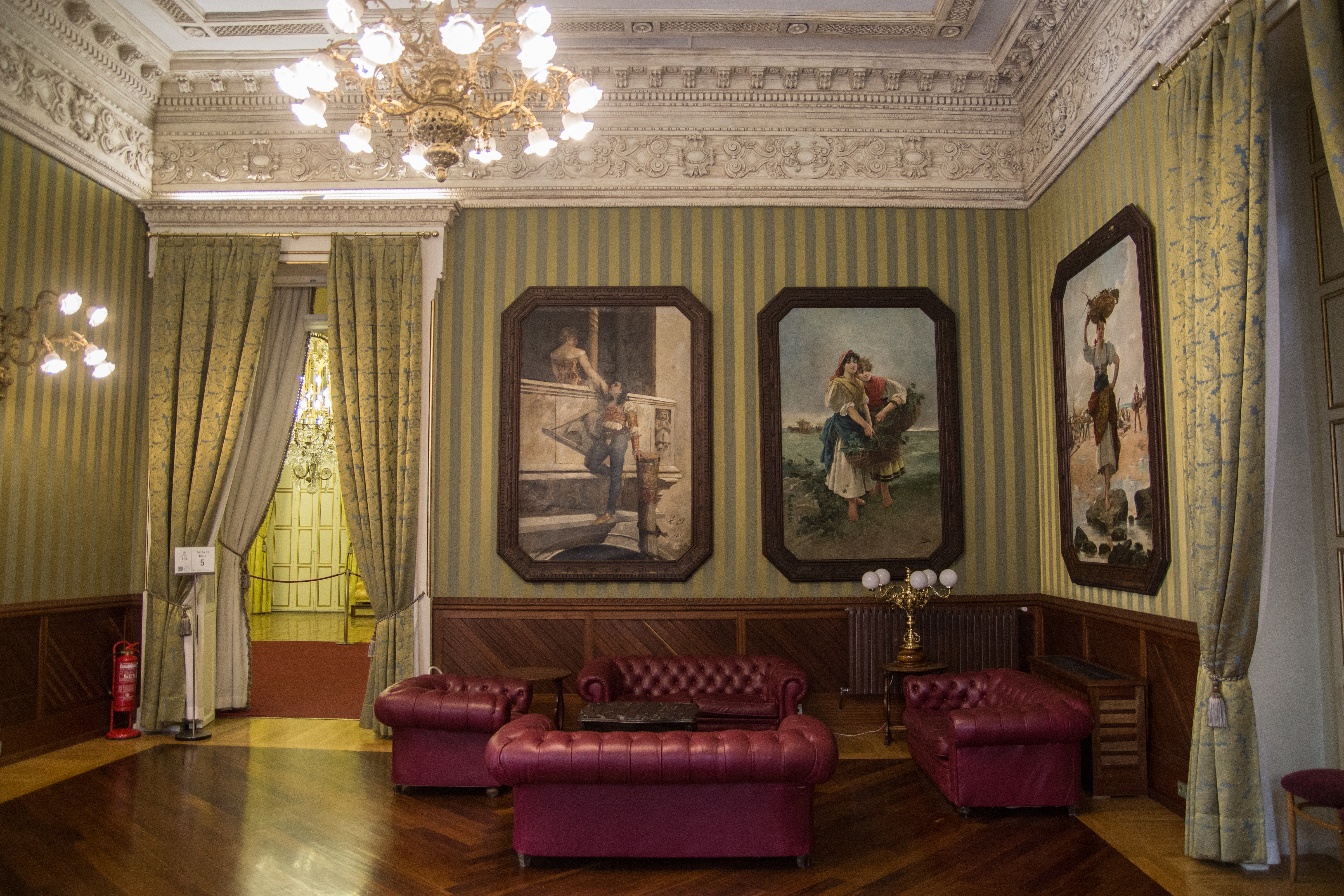 Edificio del Casino